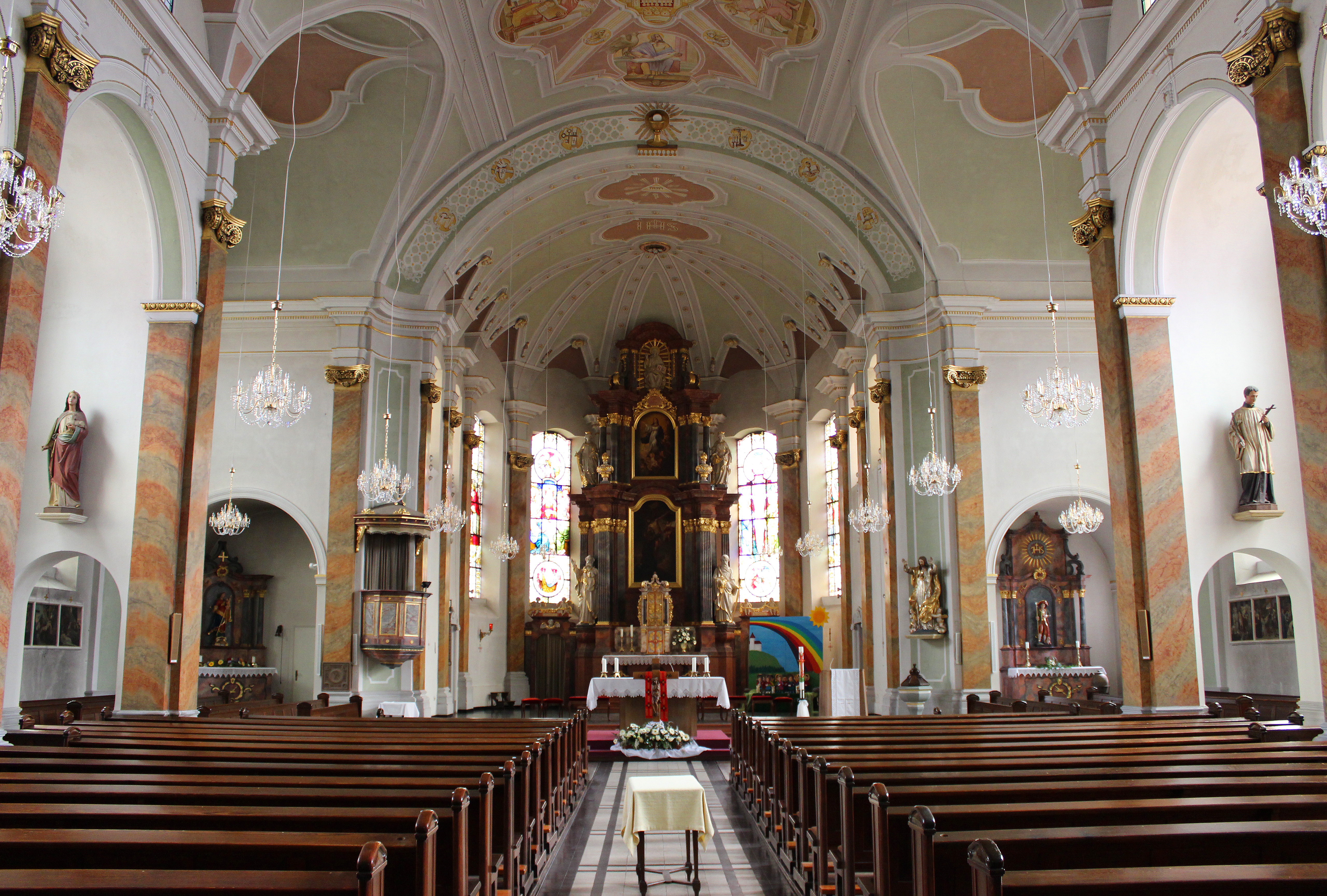 Blick ins Innere der katholischen Pfarrkirche St. Franziskus in Urexweiler, einem Ortsteil der Gemeinde Marpingen, Landkreis St. Wendel, Saarland